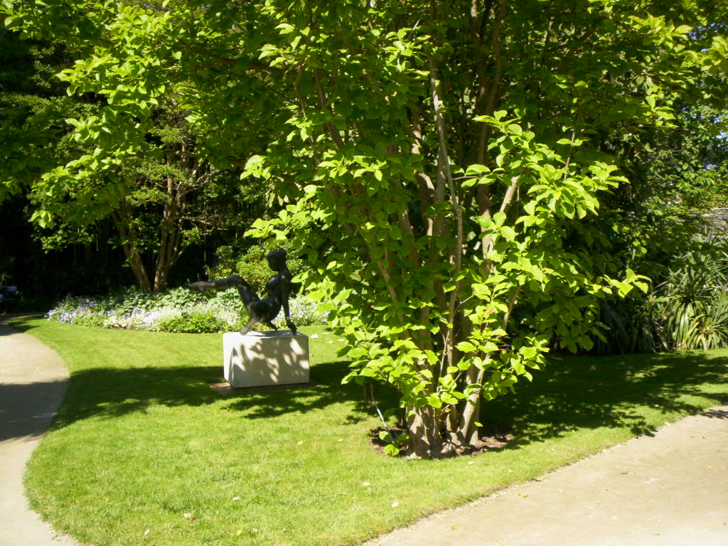 Arboretum Angers - Oeuvre de Gaston Allard dans le jardin des Ombrages